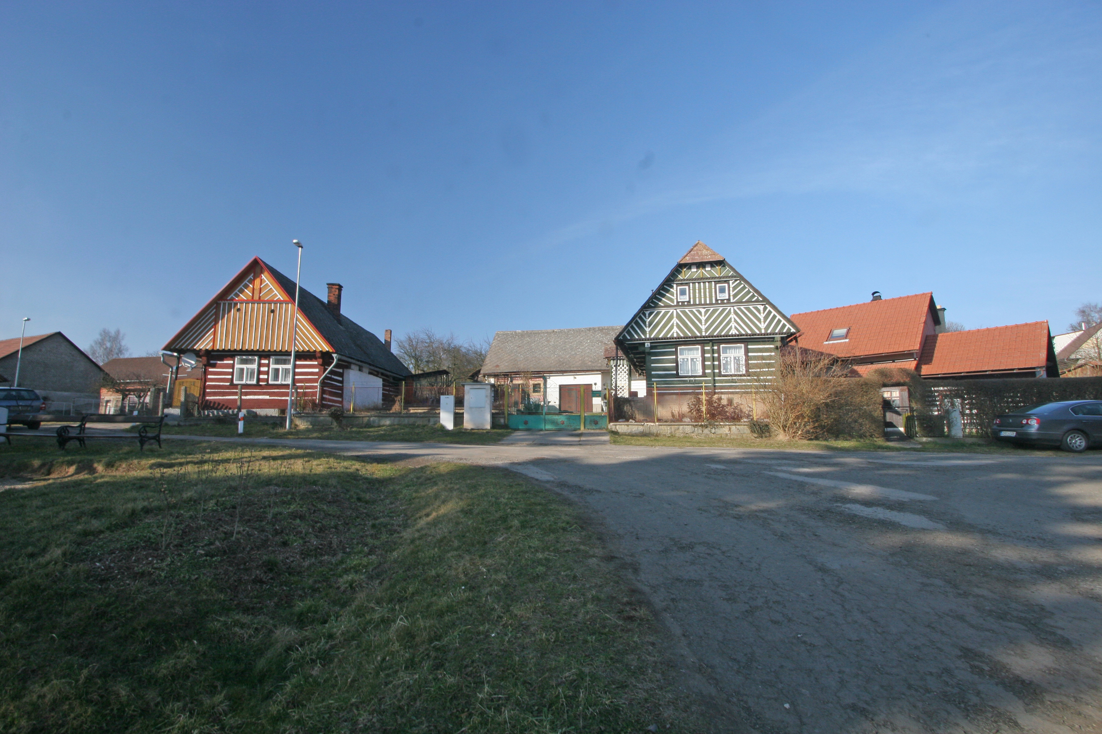 Chlum čp. 20 a 21